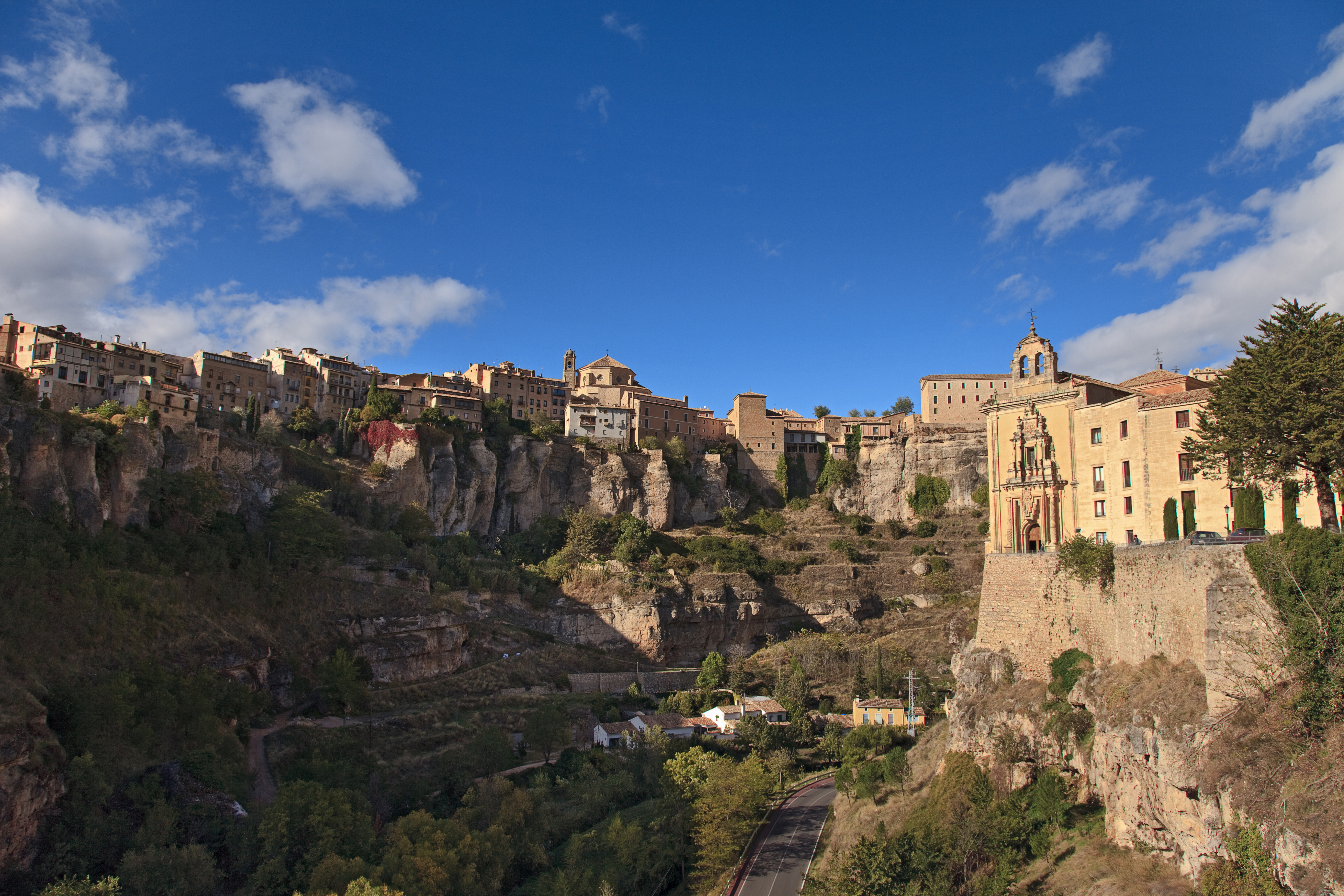 Cuenca. Castilla - La Mancha. Spain